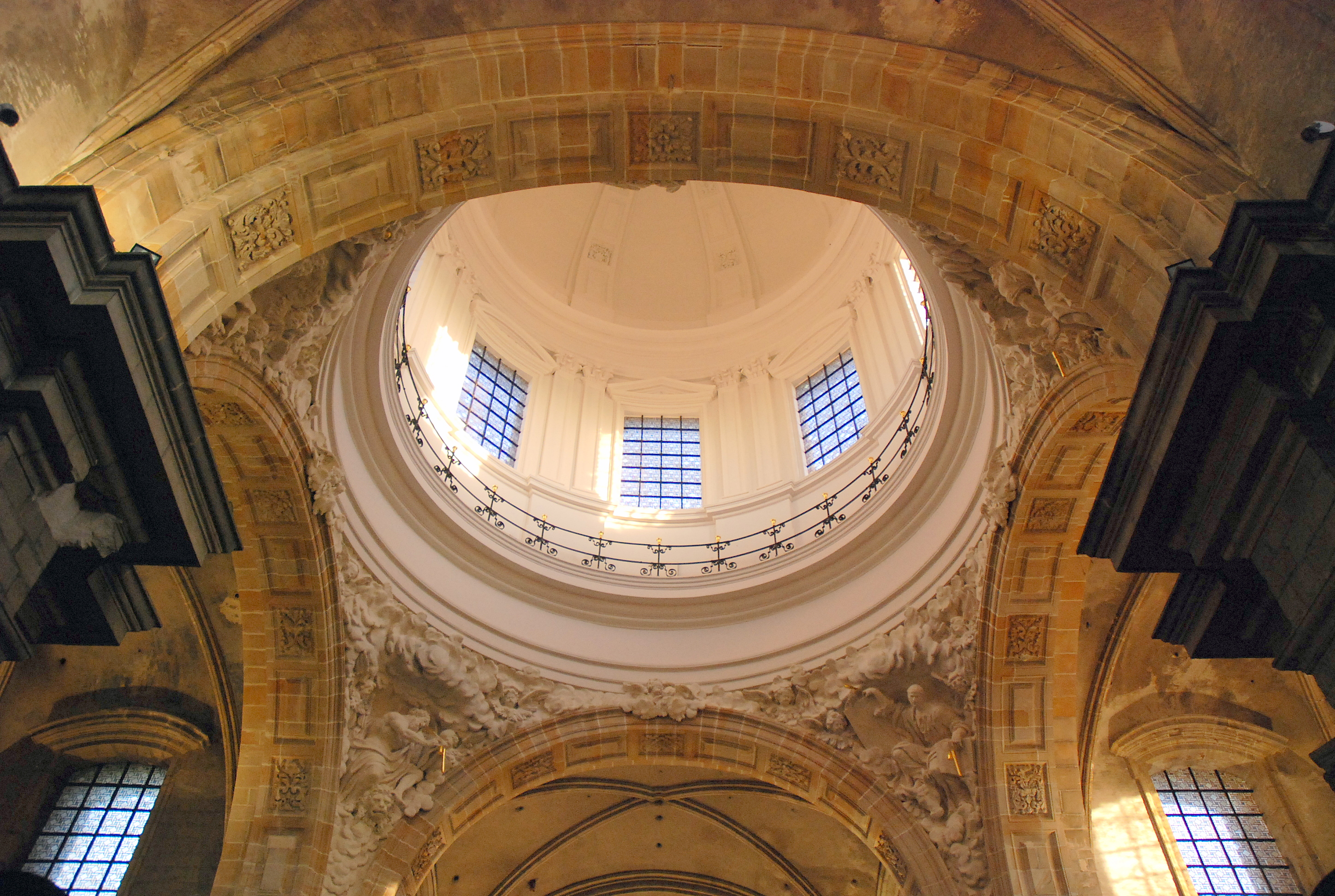 koepel van de Onze-Lieve-Vrouw-Sint-Pieterskerk te Gent, België